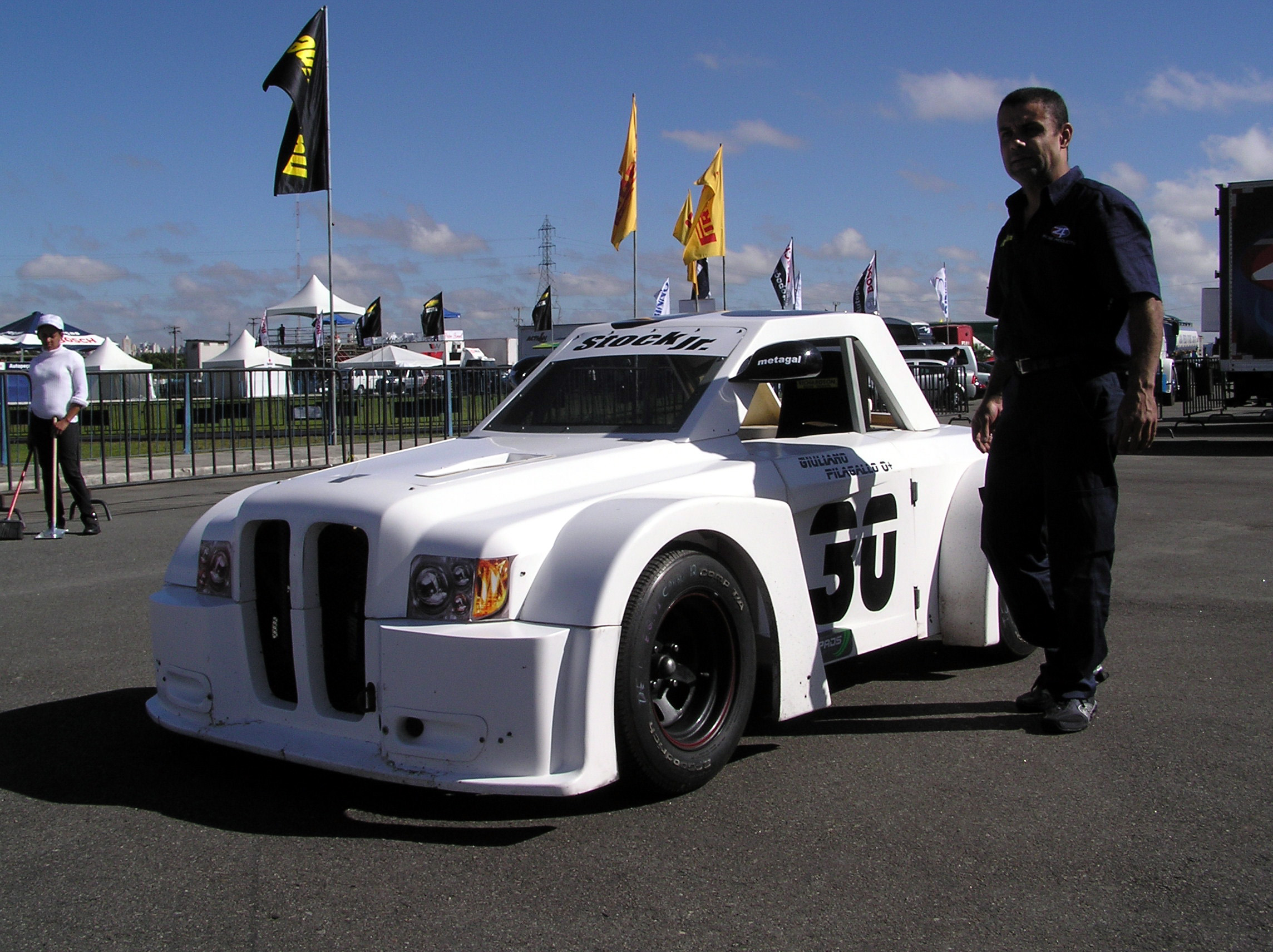 Stock Car Jr., Brasil